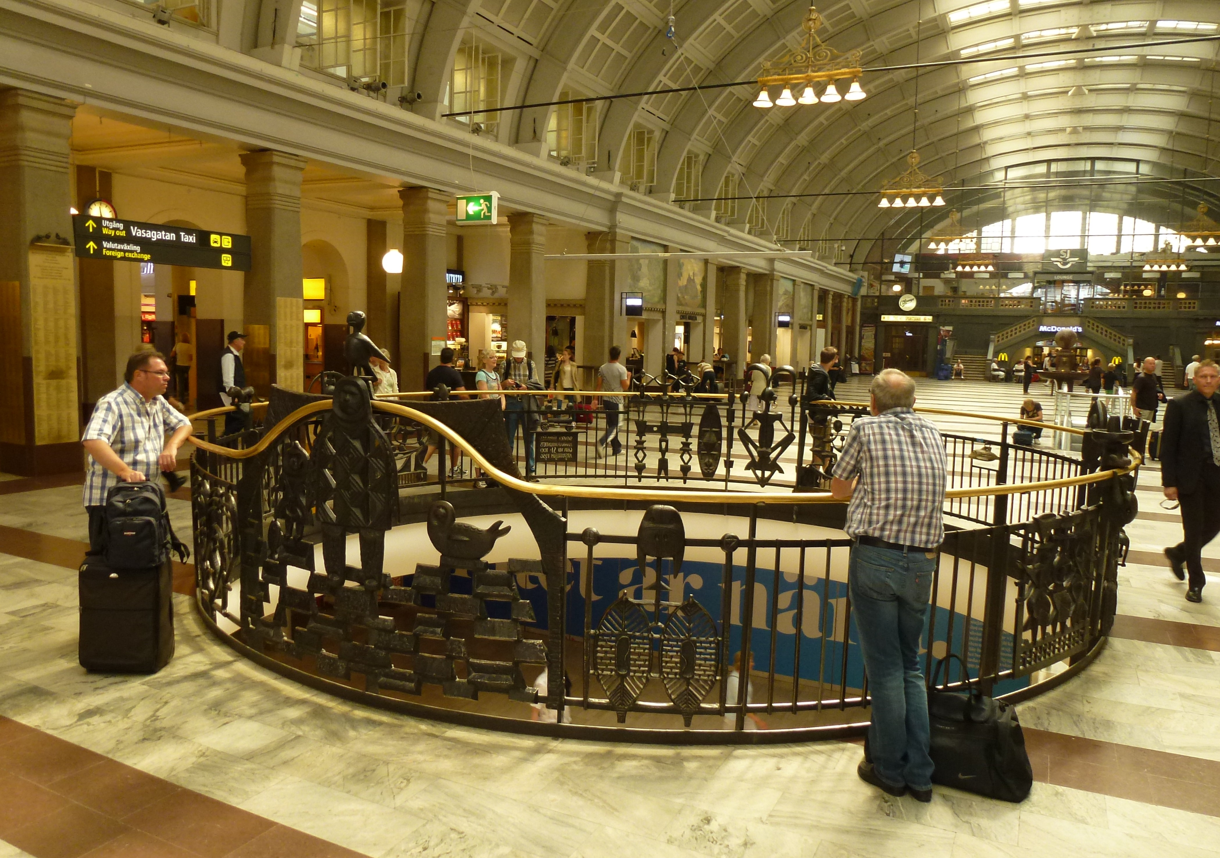 Centralhallen med rundeln även kallad "spottkoppen"